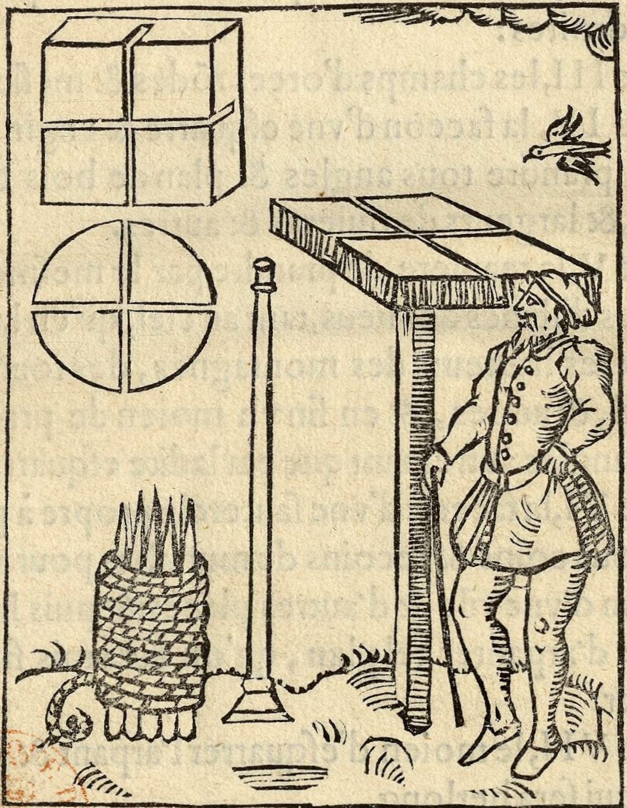 Portrait supposé d'Élie Vinet. Issu de l'ouvrage "A la Mémoire du Saintongeais Élie Vinet" de Gaston Chevrou (1910), p. 28